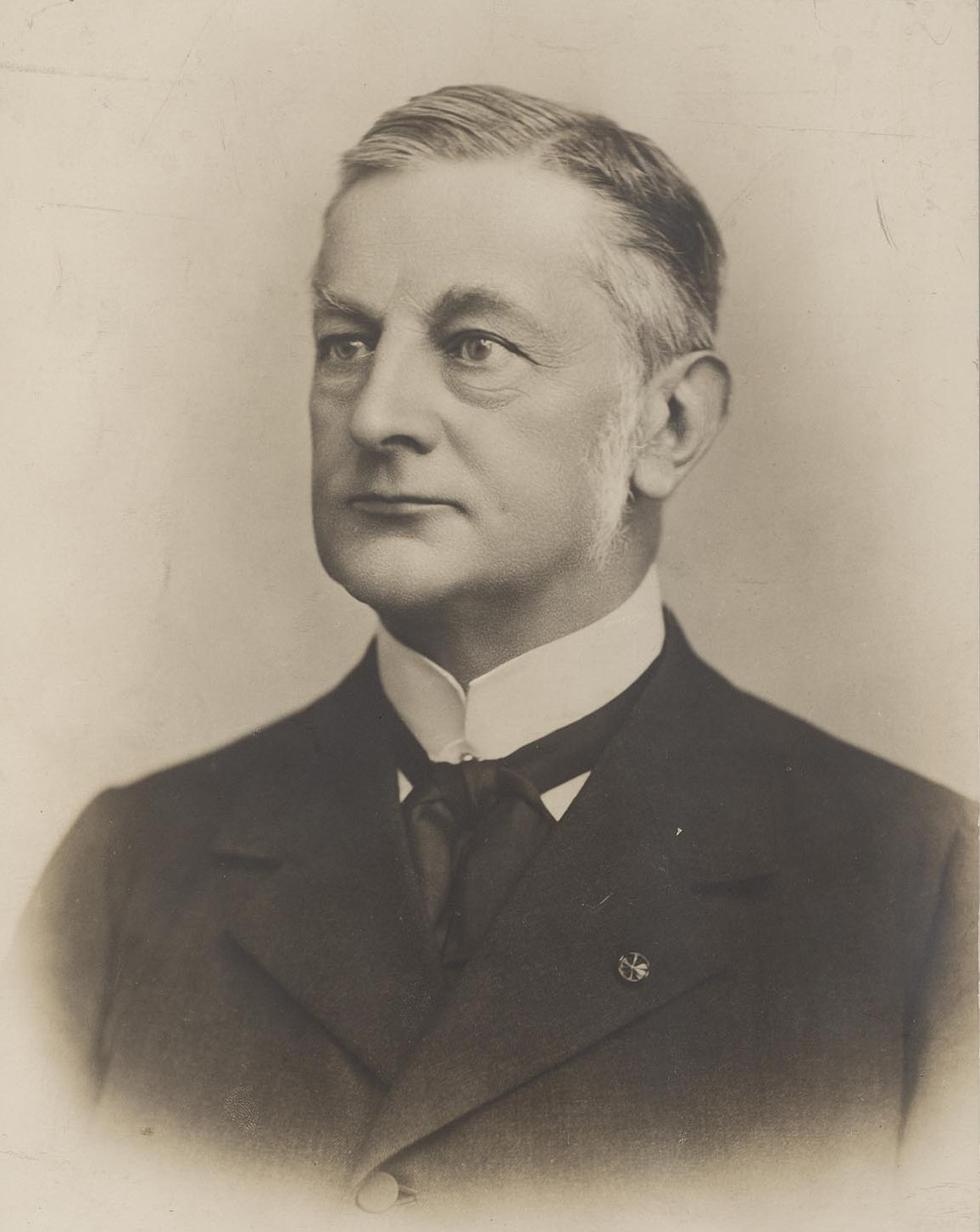 Tweede Kamerlid Alexander de Savornin Lohman